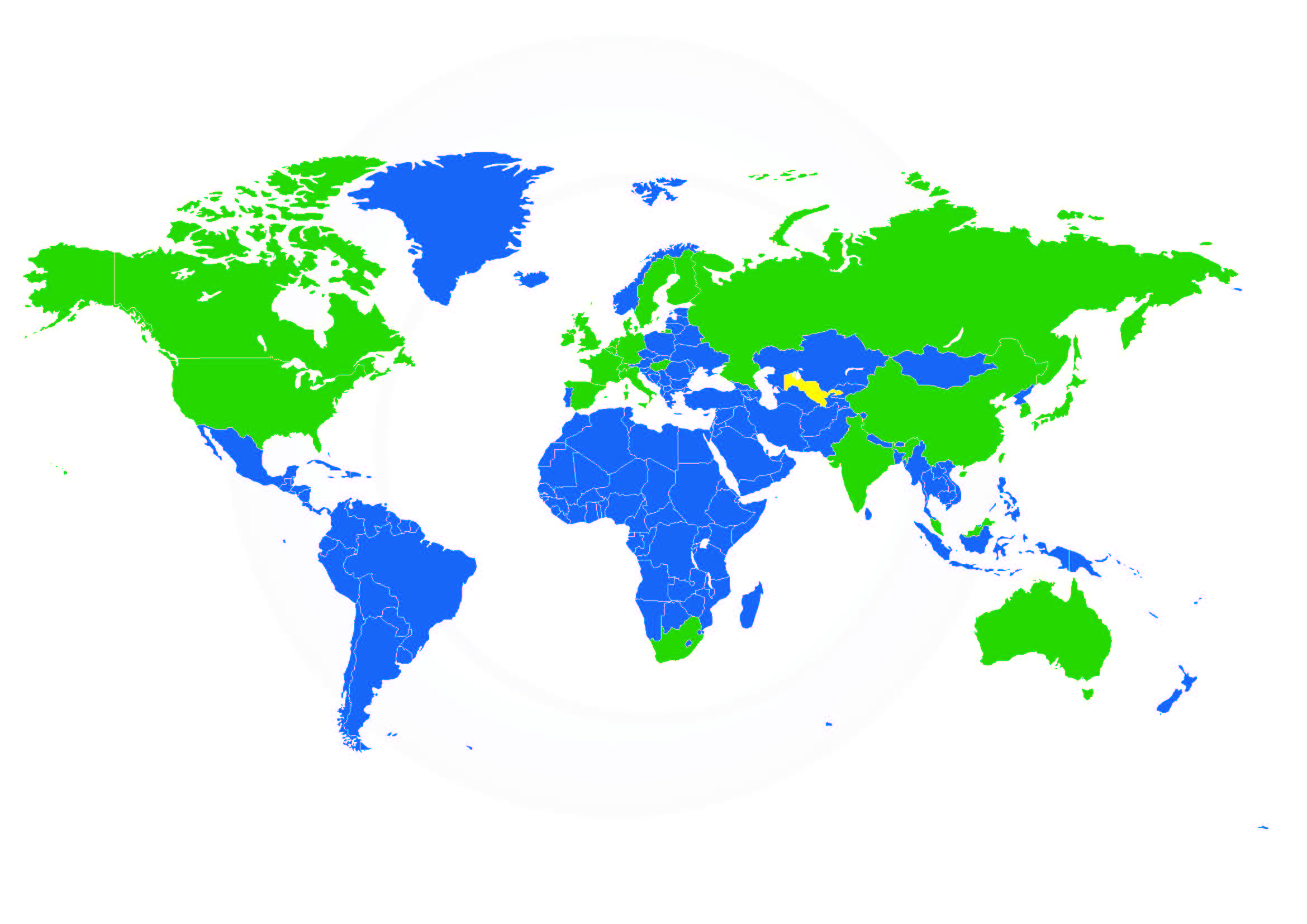 Карта мира изготовление оборудования для завода GTL в Узбекистане